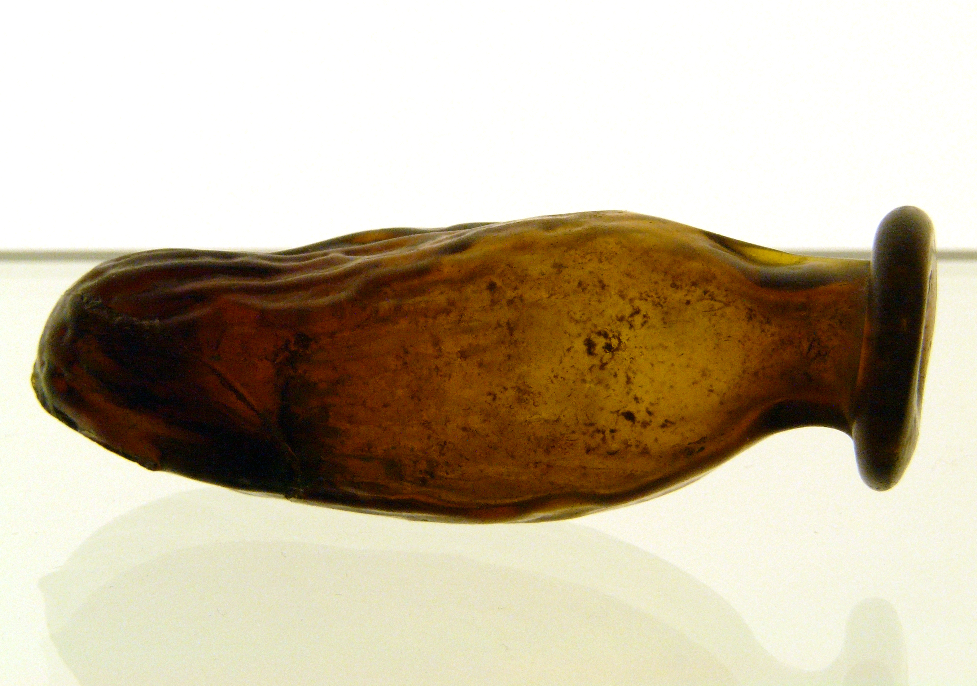 Syrisches Fläschchen in Form einer Dattel (1. Jh.) aus Gelduba, Museumszentrum Burg Linn